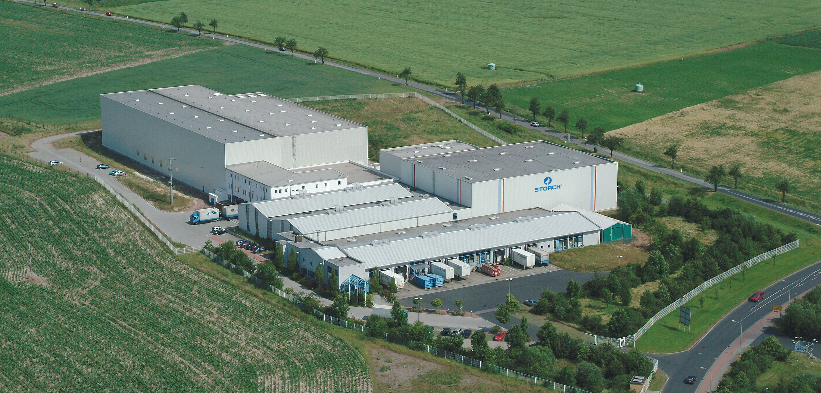 STORCH-Logistikzentrum in Berka/Werra